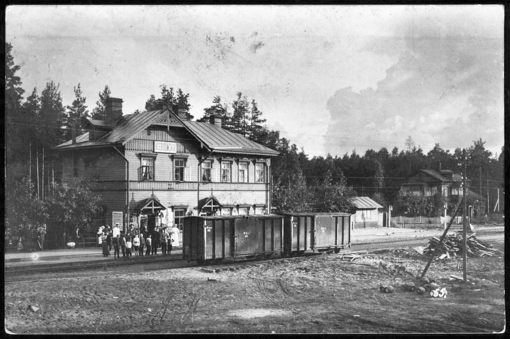 Вокзал во Всеволожске